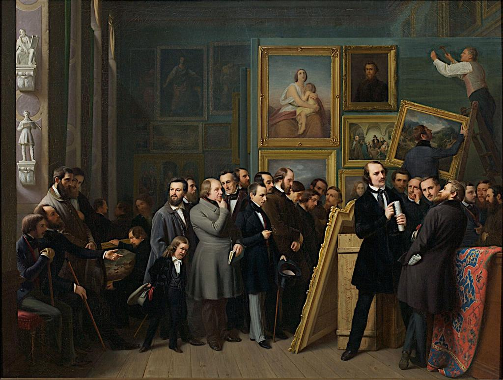 Dargestellt: Wilhelm von Schadow (1788–1862) Ernst Deger (1809–1885) Franz Ittenbach (1813–1879) Xaver Seifensand (1809–1876) Karl Josef Ignatz Mosler (1788–1860) Johann Peter Hasenclever (1810–1853) Johann Wilhelm Preyer (1803–1889) Johann Wilhelm Schirmer (1807–1863) Carl Wilhelm Hübner (1814–1879) Carl Friedrich Lessing (1808–1880) Henry Ritter (1816–1853) Adolf Schrödter (1805–1875) Caspar Johann Nepomuk Scheuren (1810–887) Karl Schnaase (1798–1875) Karl Friedrich Boser (1809–1881)